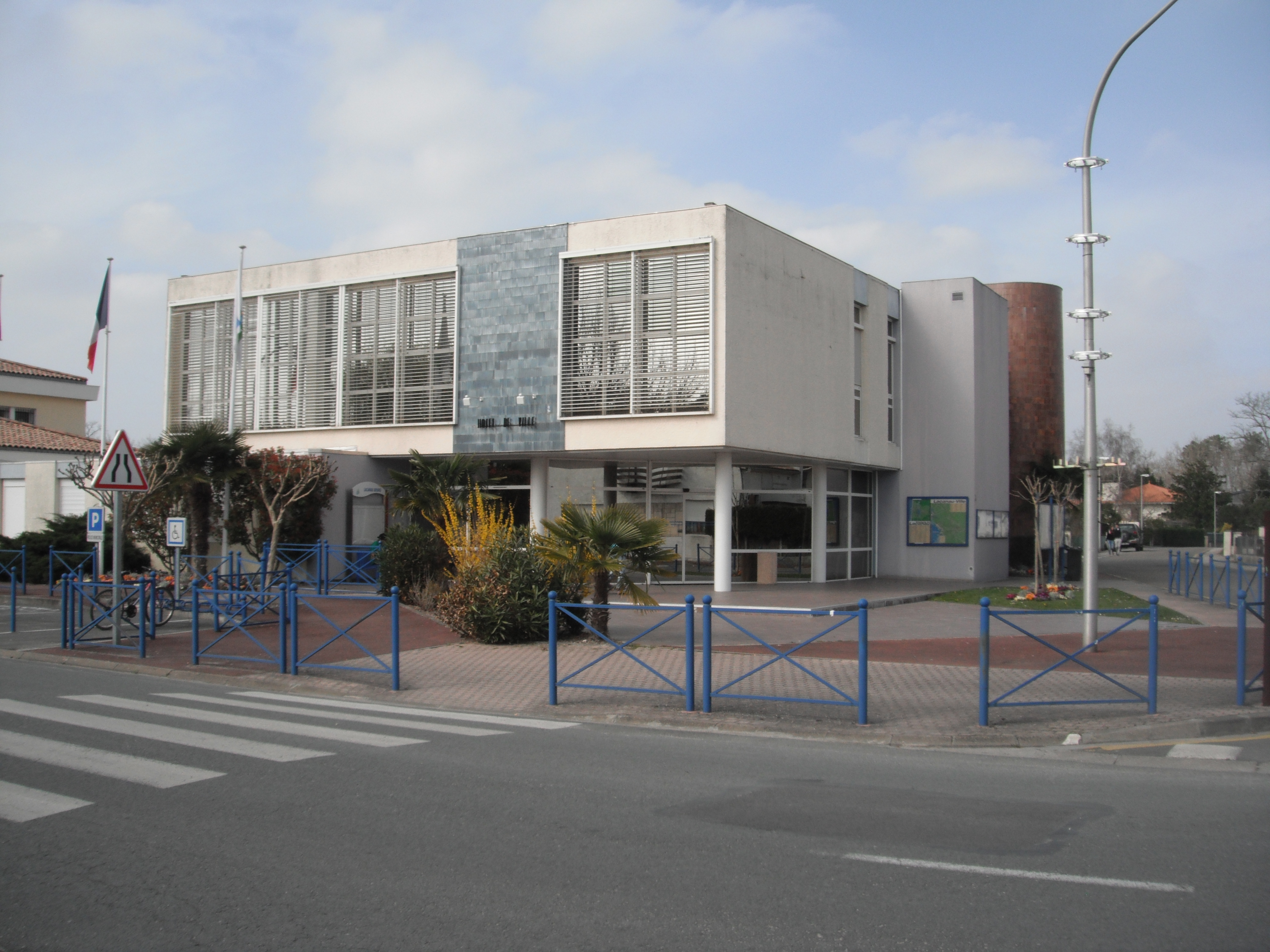 Hôtel de ville - Lacanau-Ville (Gironde, France)